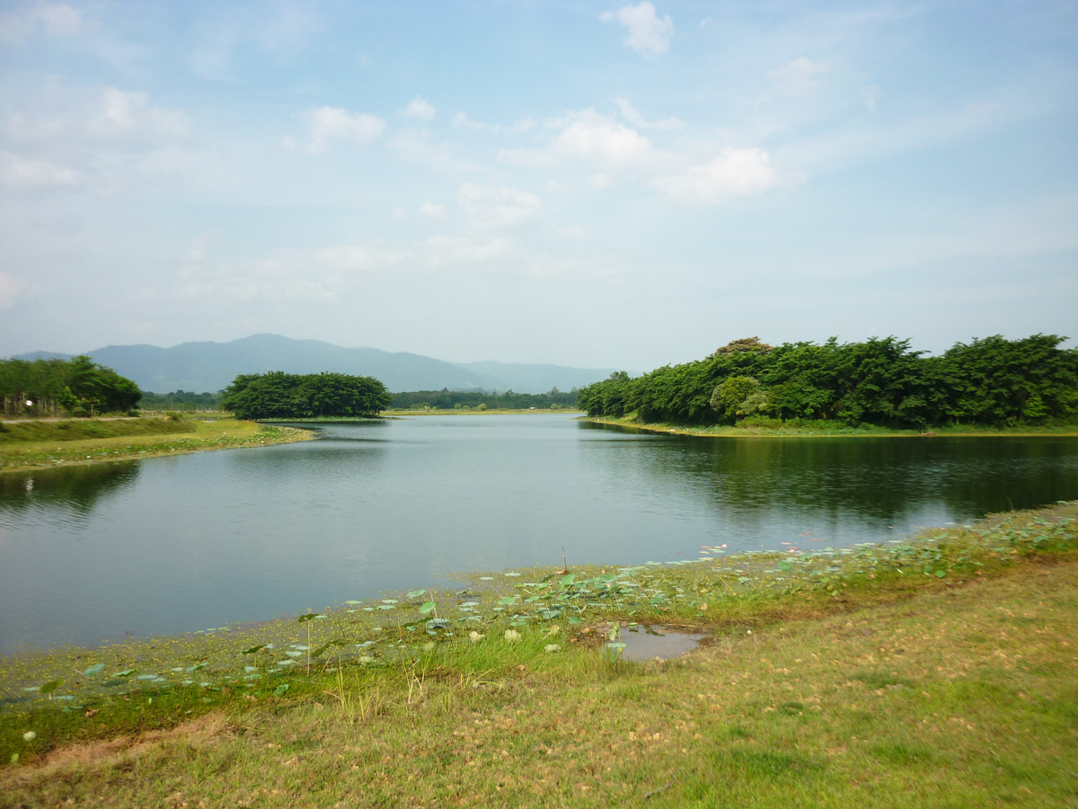 บึงน้ำใส ตะโล๊ะหะลอ